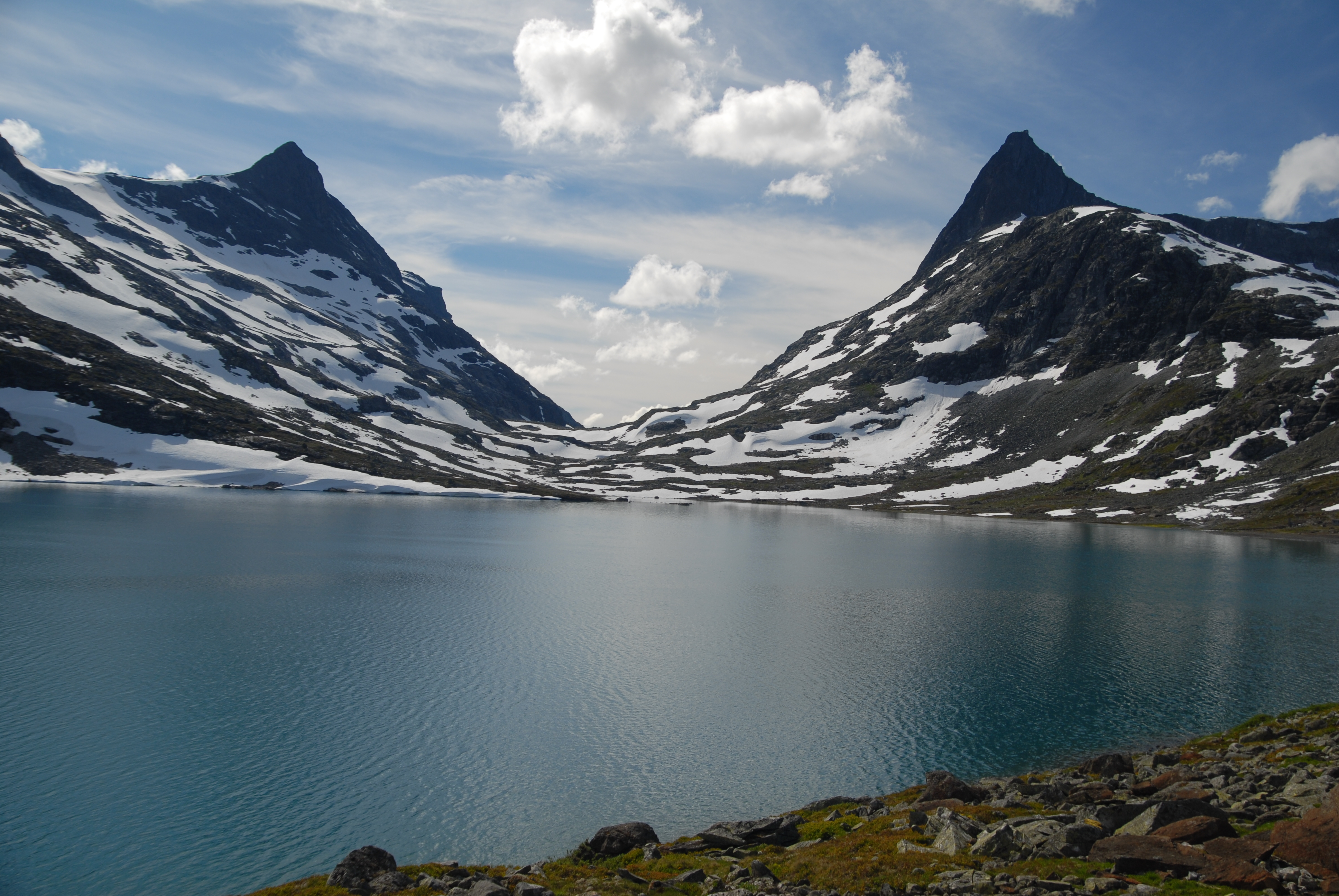 Fv. Hjelledalstind og Falketind til høyre.